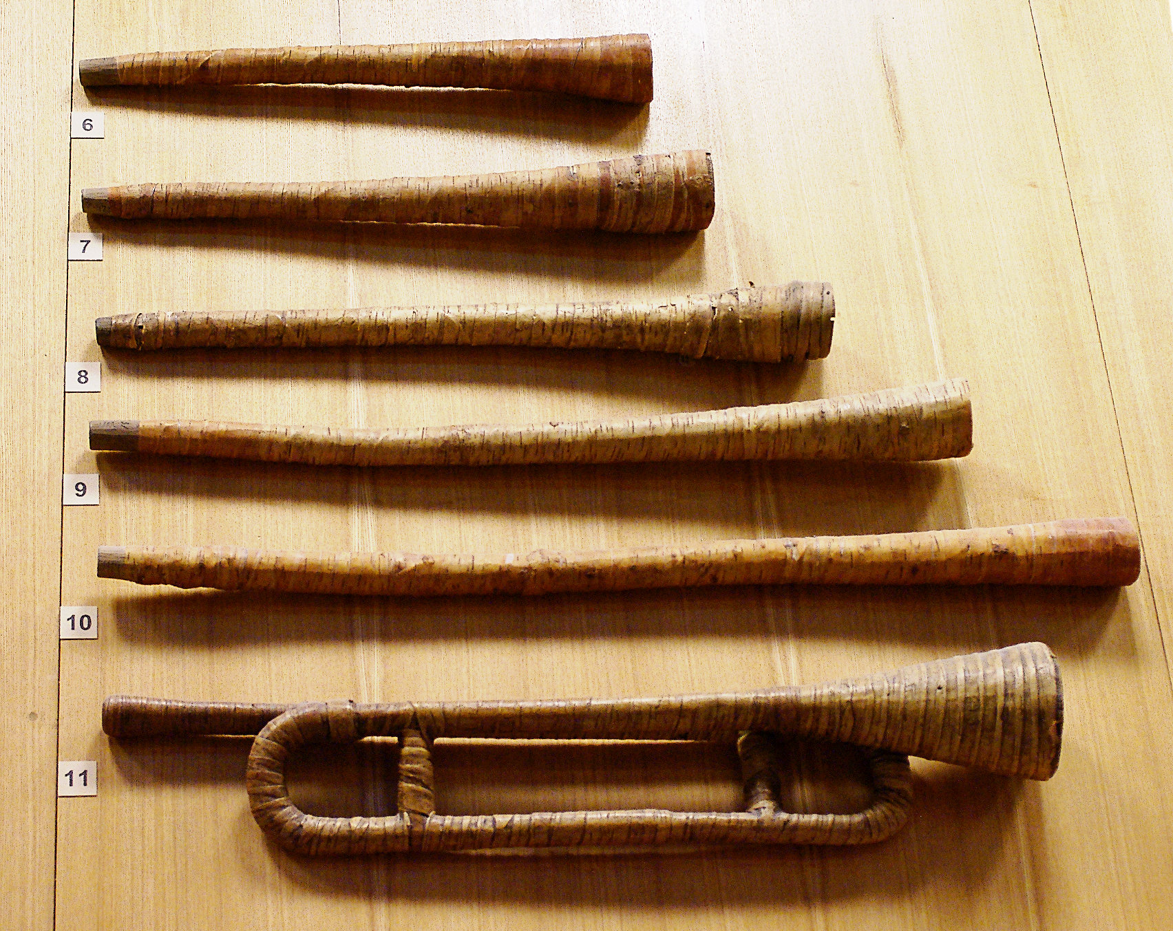 6-10 - Рагаи. пастушеческие рожки. Ковенская губ., Поневежский удел. Начало XX века. Литовцы11 - Коленами - труба пастушеческая, работа "каргопола" - русского пастуха. Олонецкая губерния, деревня Кондые-Вуара. Конец XIX века, Карелы